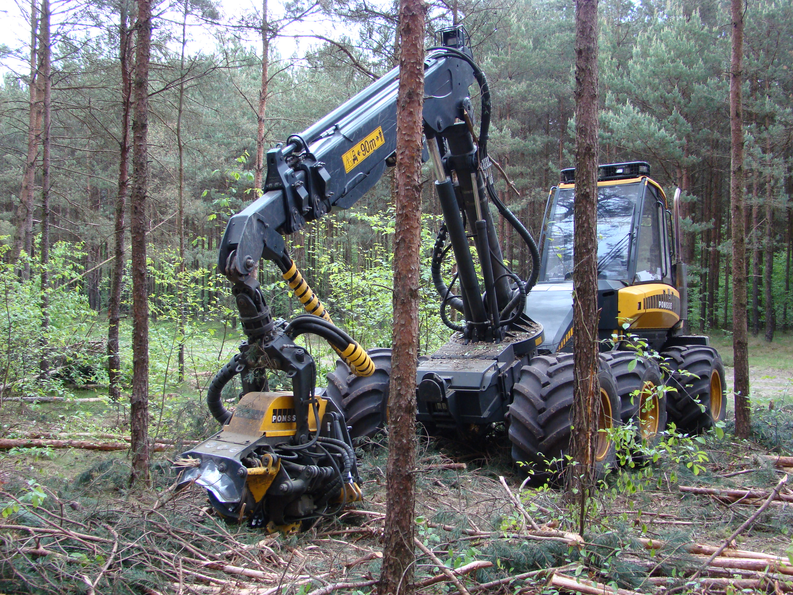 Ponsse-Holzvollernter (Harvester) im Kiefernwald